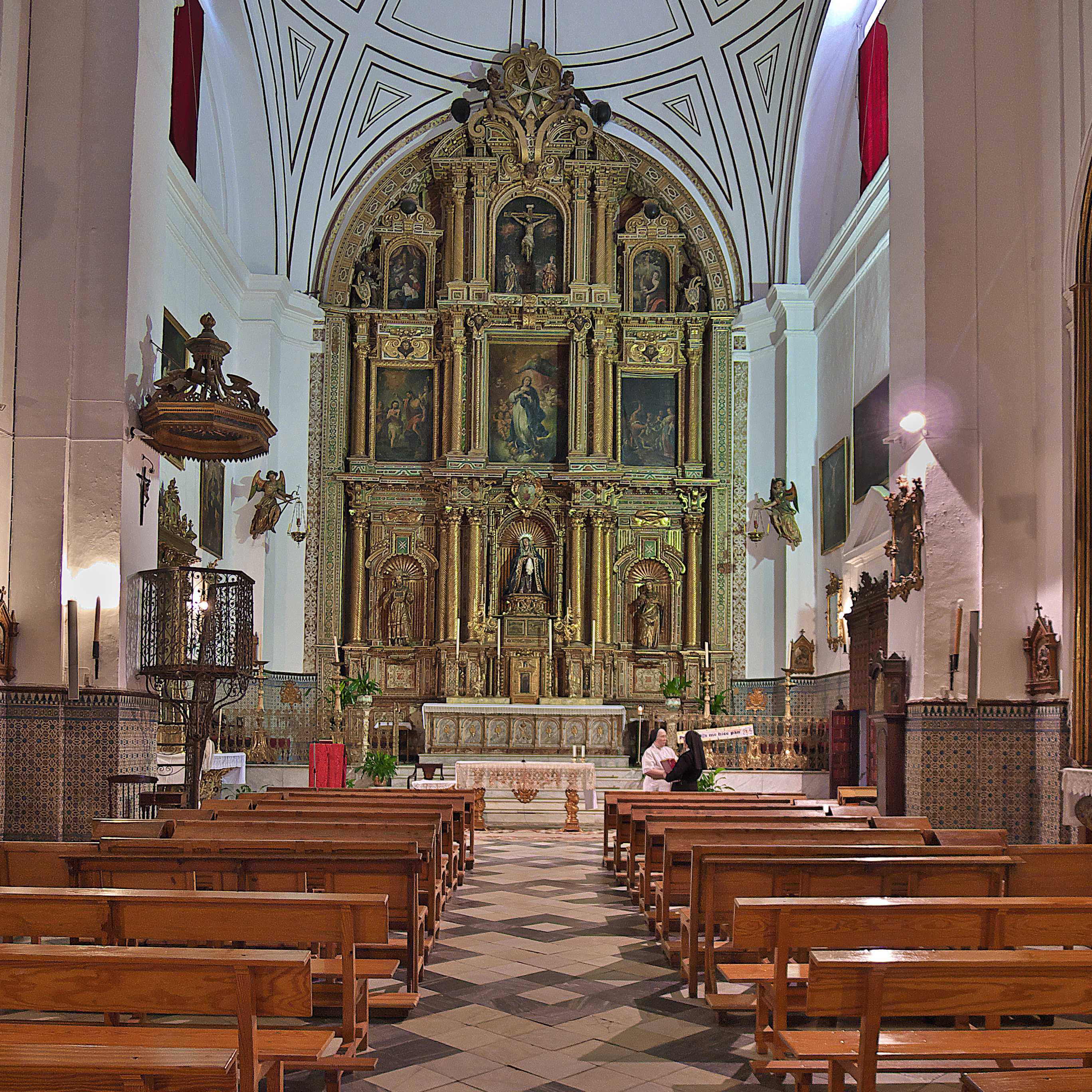 Alonso de Vandelvira proyecta la iglesia de la Orden de San Juan (1602-1609), ejecutada por Juan de los Reyes y Diego Coronado. El retablo lo diseñó Juan de Mesa y ensamblado por Antonio de Santa Cruz (ca. 1624). La francesada expolió sus pinturas, principalmente.